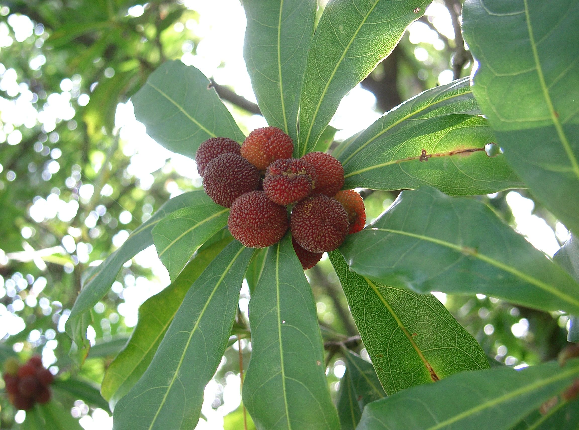 Morella rubra